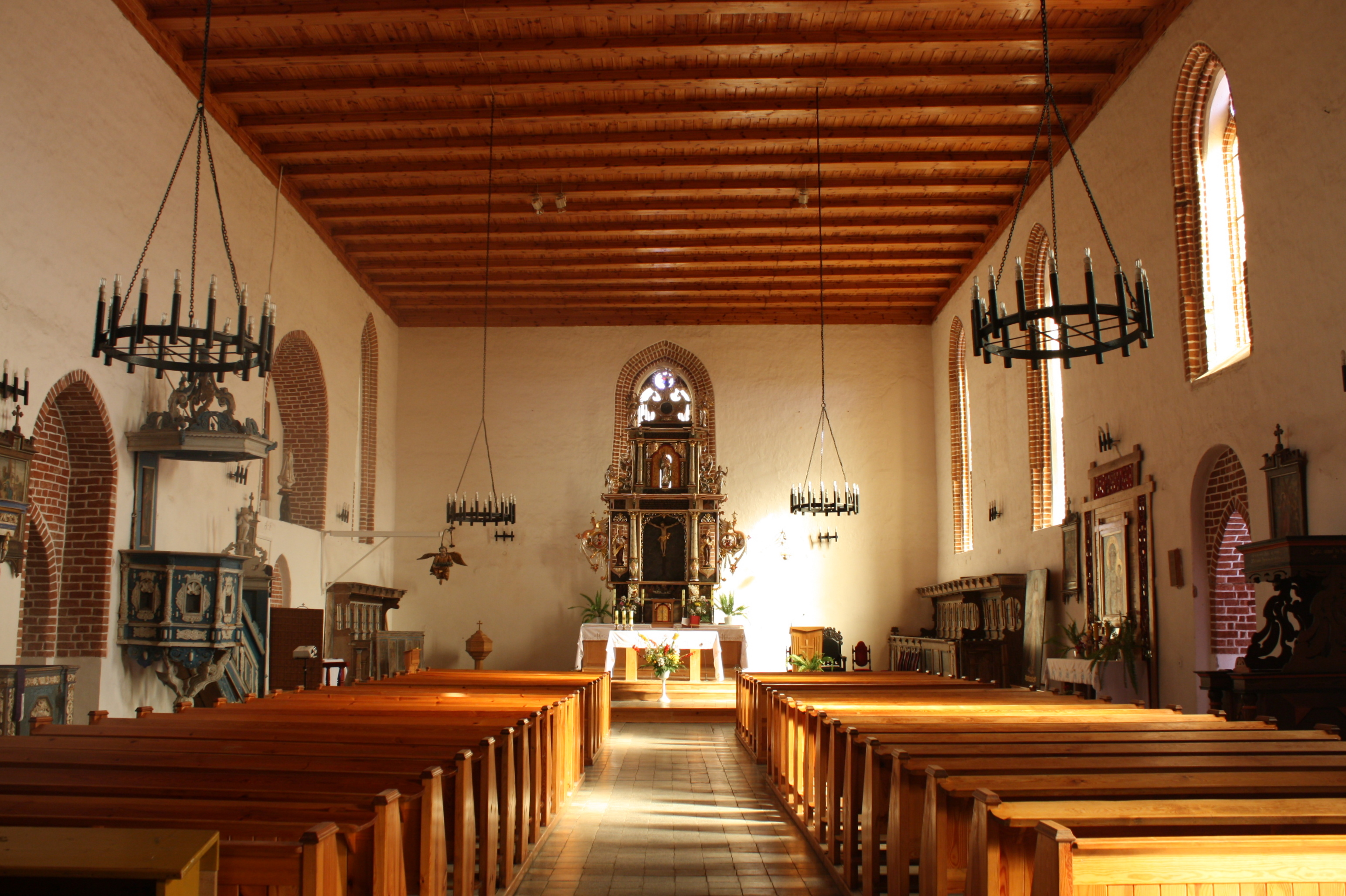 Barciany - wnętrze rzymskokatolickiego kościoła parafialnego p,w. Niepokalanego Serca NMP, 4 ćw. XIV, XVI, XVIII, XIX You can see all photographs in category Wikiekspedycja 2012. The making of this document was supported by Wikimedia Polska.